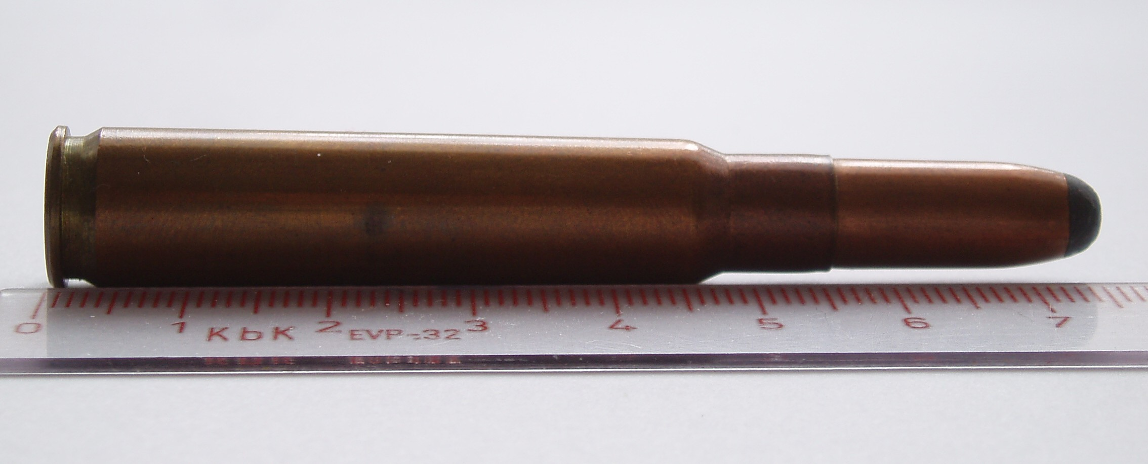 8 x 56 Mannlicher-Schoenauer rifle cartrdige.SP bullet.